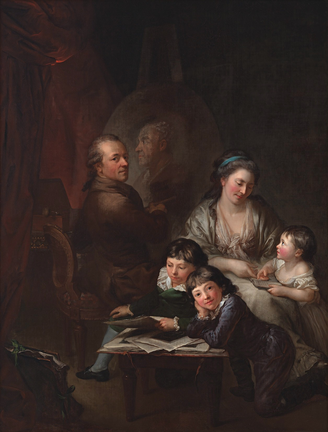 Das Gemälde entstand als Auftragsarbeit für Peter Graf von Biron Herzog von Kurland und Sagan und war ab 1786 in dessen Besitz auf Schloss Friedrichsfelde bei Berlin bzw. in seinem Berliner Stadtpalais; ab 1881 war das Bild im Schloss zu Sagan; am 2. Dezember 1899 Verkauf auf der Auktion Talleyrand für FF 17.500.-; 1901 war das Bild im Besitz von Comte Jean de Castellan in Paris. Heute im Museum Oskar Reinhart am Stadtgarten in Winterthur. Das Gemälde wurde auf der am 25. September 1788 eröffneten Ausstellung der Berliner Kunstakademie gezeigt (Katalognummer 76).